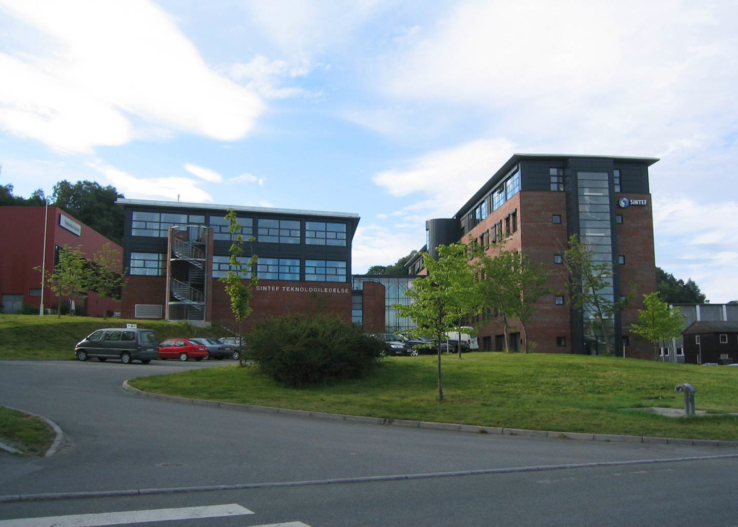 Valgrinda, der bl.a. NTNU UB Biblioteket Valgrinda ligger. Reist i ... Arkitekt: ...